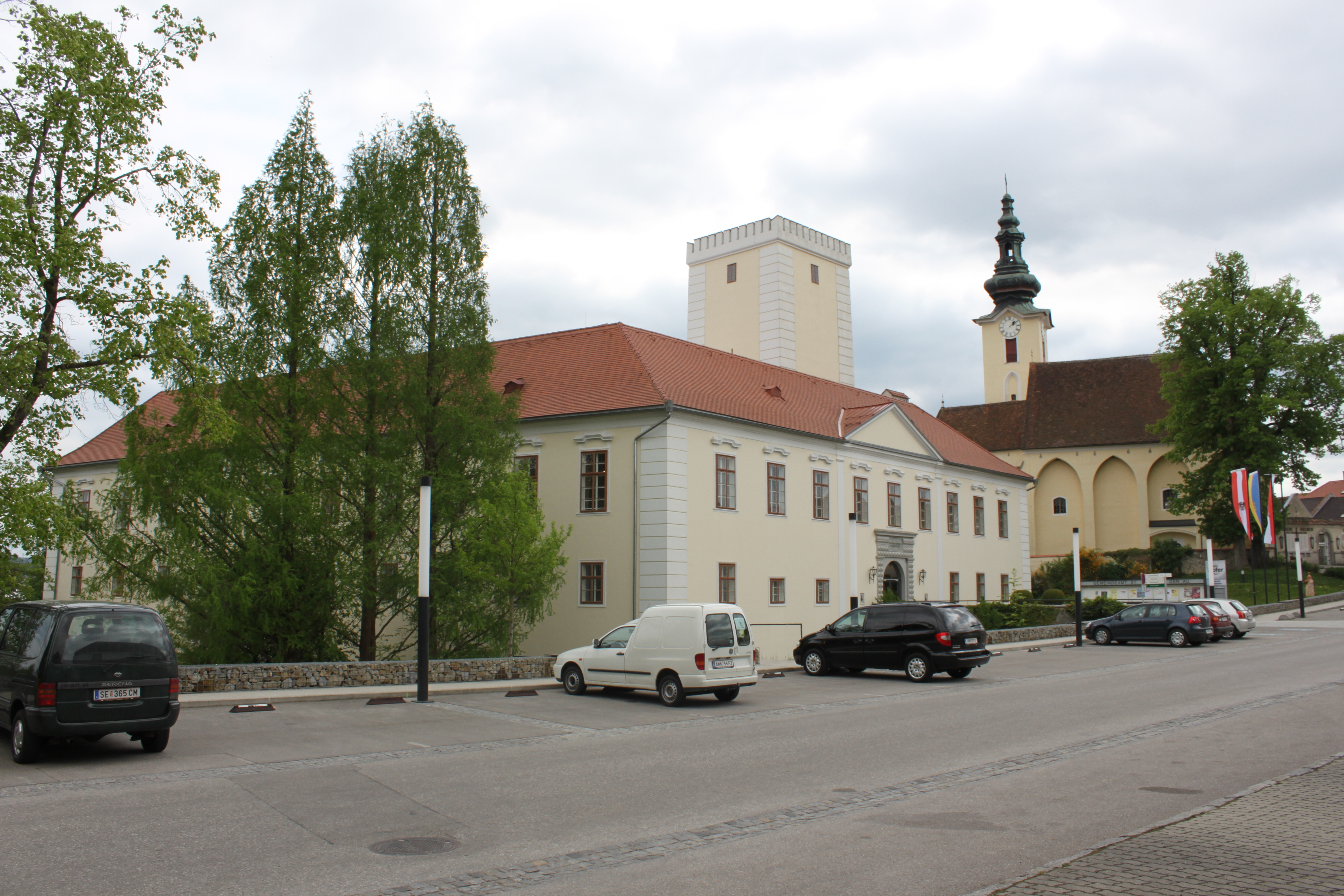 Schloss St. Peter in der Au, im Hintergrund die Pfarrkirche Hll. Petrus und Paulus